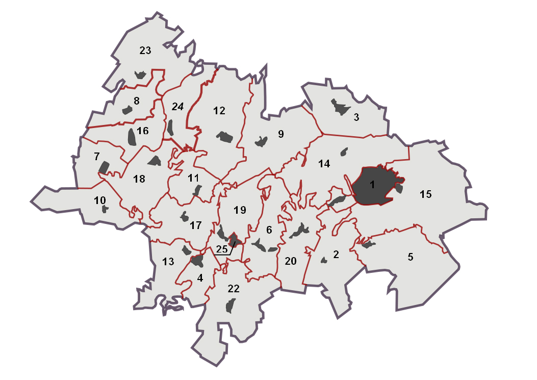 Муниципальные образования в составе Лениногорского муниципального района. 1. Лениногорск. 2. Глазовское сельское поселение. 3. Зай-Каратайское сельское поселение. 4. Зеленорощинское сельское поселение. 5 . Ивановское сельское поселение. 6. Каркалинское сельское поселение. 7. Кармалкинское сельское поселение. 8. Керлигачинское сельское поселение. 9. Куакбашское сельское поселение. 10 Мичуринское сельское поселение. 11. Мукмин-Каратайское сельское поселение. 12. Нижнечершилинское сельское поселение. 13. Новоиштерякское сельское поселение. 14. Новочершелинское сельское поселение. 15. Письмянское сельское поселение. 16. Сарабикуловское сельское поселение. 17. Староиштерякское сельское поселение. 18. Старокувакское сельское поселение. 19. Старошугуровское сельское поселение. 20. Сугушлинское сельское поселение. 21. Тимяшевское сельское поселение. 22. Туктарово-Урдалинское сельское поселение. 23. Урмышлинское сельское поселение. 24. Федотовское сельское поселение. 25. Шугуровское сельское поселение.